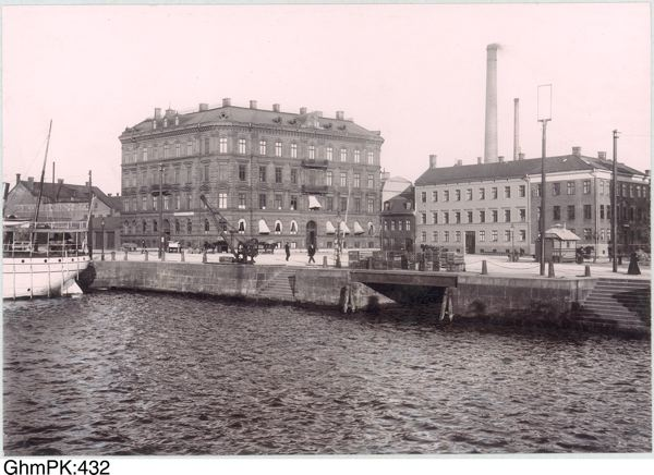 Lilla Klädpressaregatan 1 - Östra Hamngatan 2 - Kanaltorget 1 i stadsdelen Nordstaden i Göteborg. Foto år 1902. Göteborgs stadsmuseum GhmPK:432.